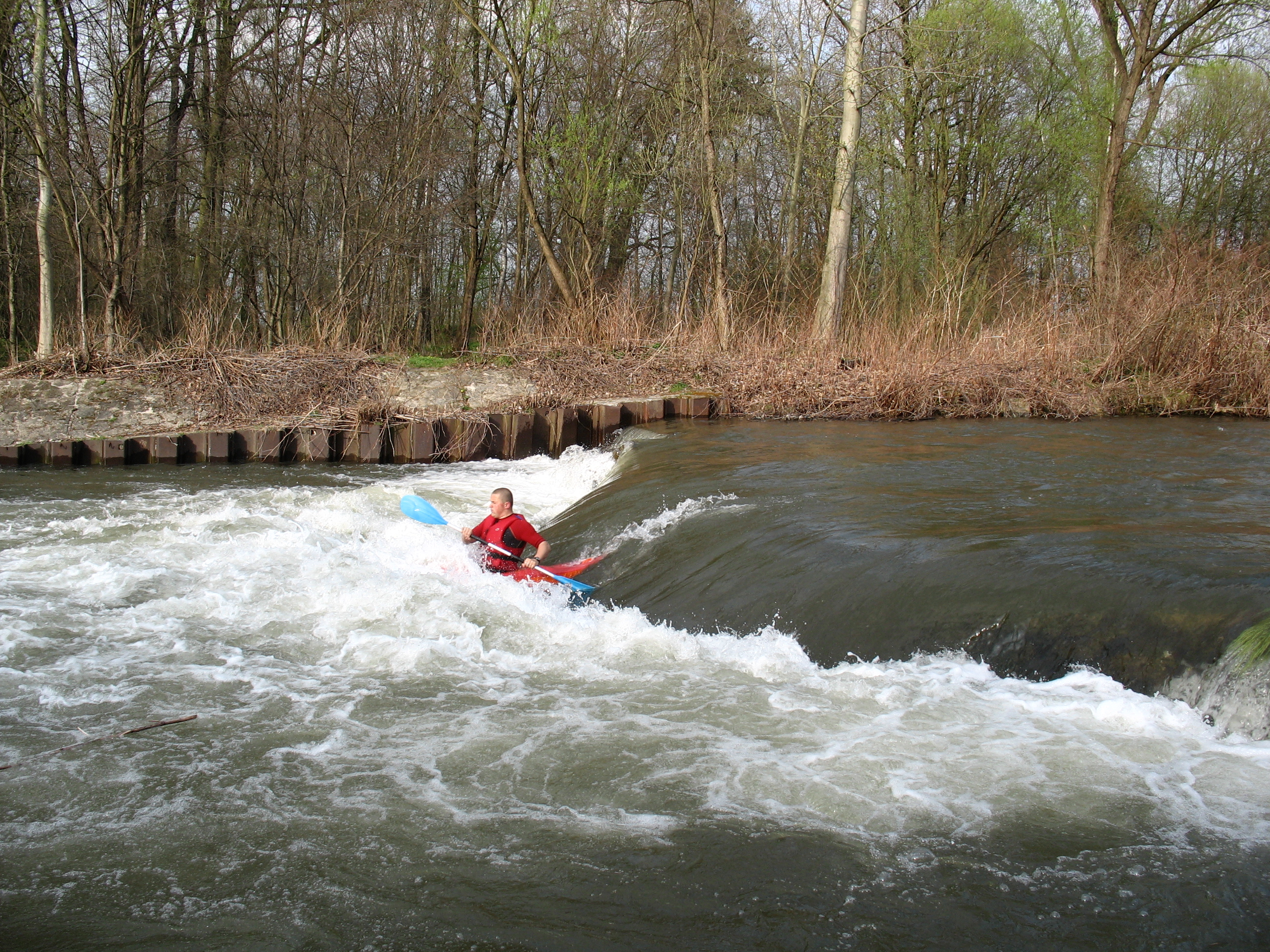 rzeka Biała Głuchołaska jest raczej zapomnianym szlakiem kajakowym, ale daje dużo radości w okresie wiosennym.